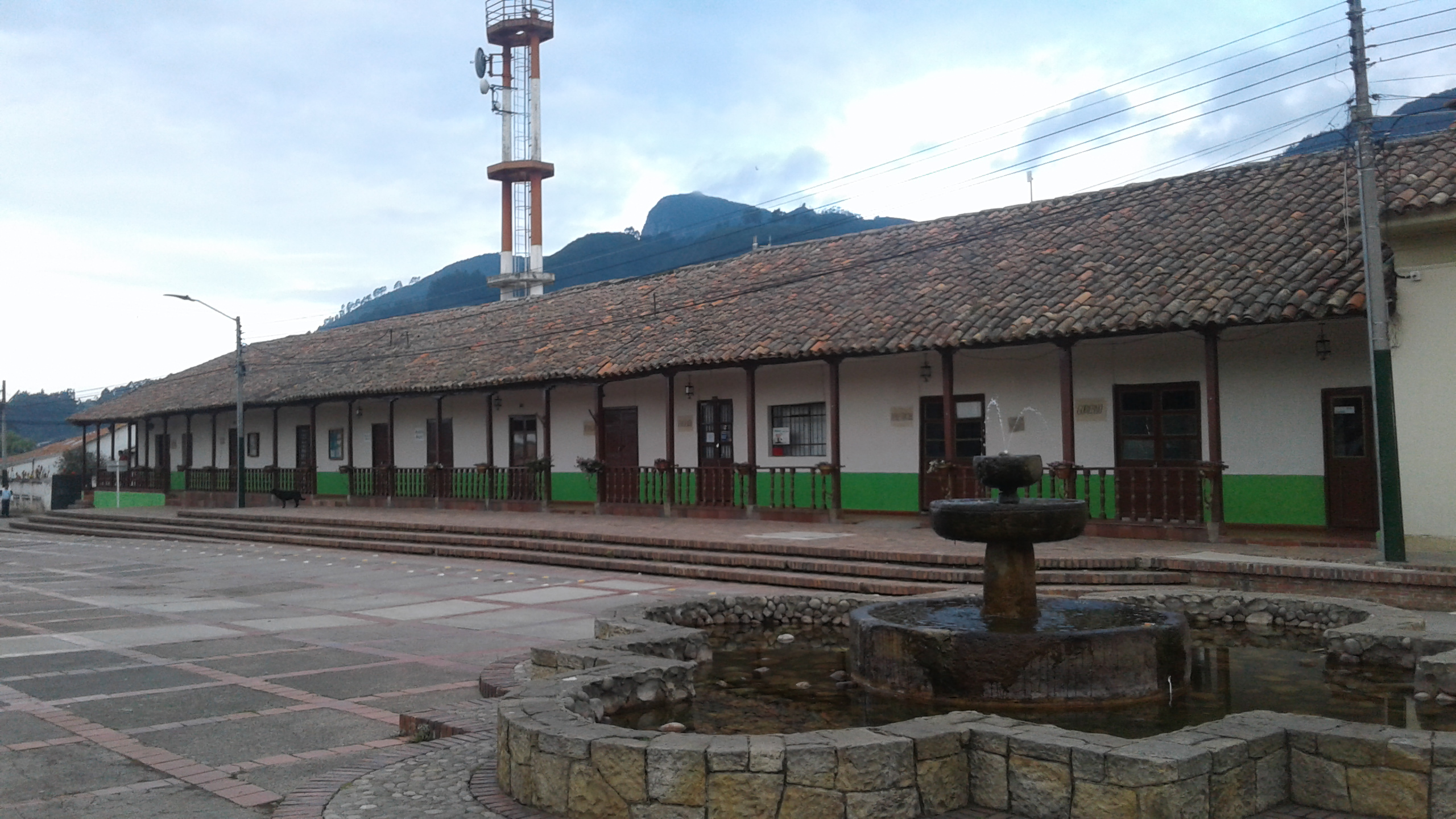 Edificio de la alcaldía (Tabio, Cundinamarca, Colombia)